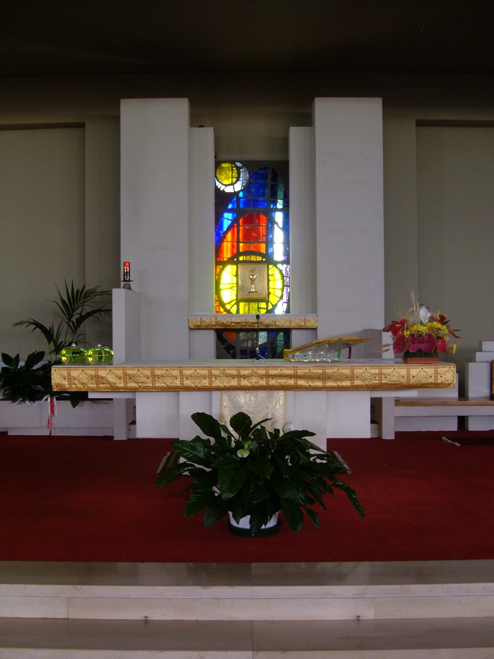 Chiesa di San Giulio, a Roma, nel quartiere Gianicolense.